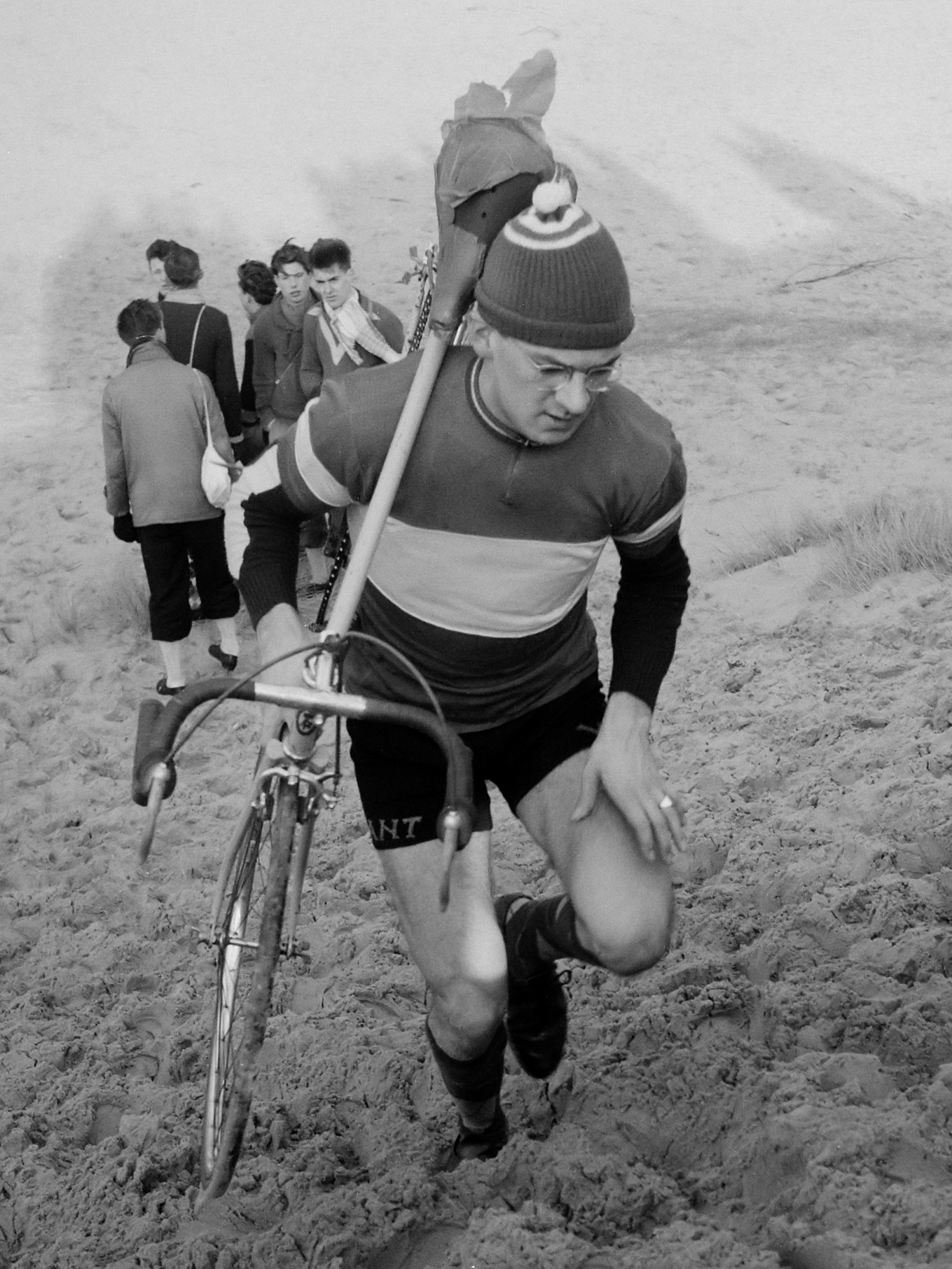 Cycle Cross Kraantje Lek (Braakmanprijs) Piet van Heusden 16 januari 1954